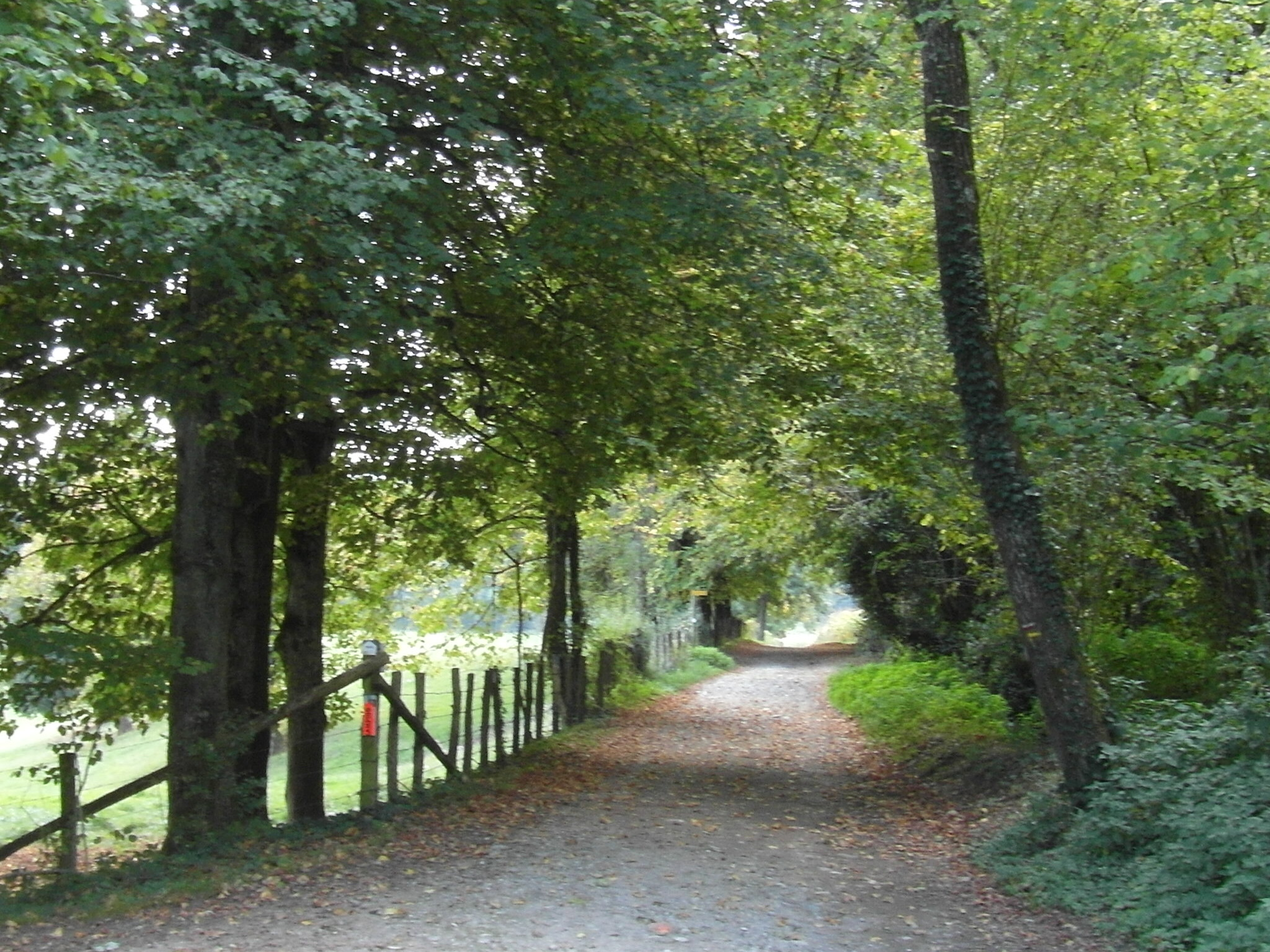 Chemin d'accès à la Sylve bénite depuis Oyeu en 2017